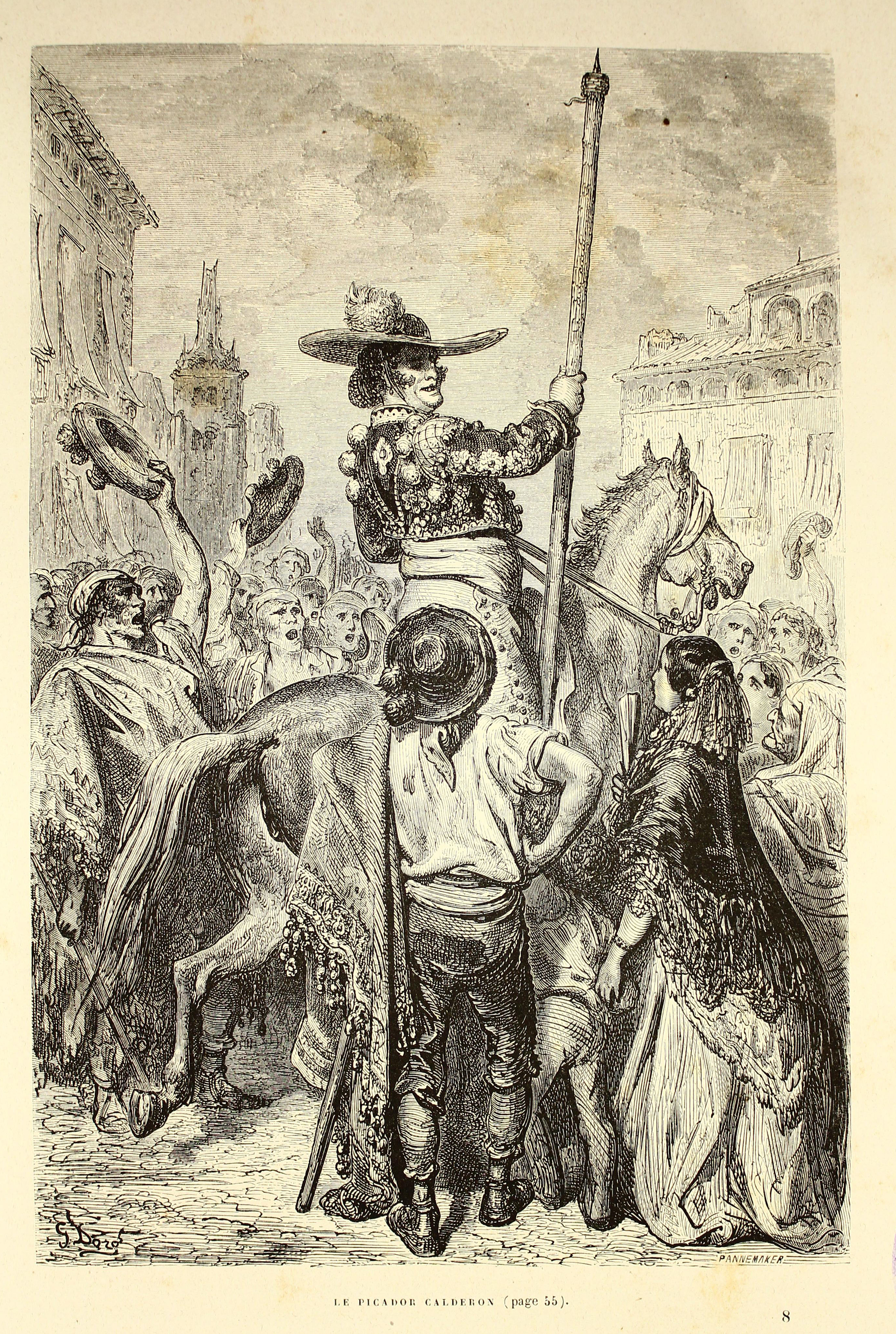 Autor: Davillier, Jean Charles, barón, 1823-1883 Descripción bibliográfica: L'Espagne / par Le Baron CH. Davillier ; ilustrée de 309 gravures dessinées su bois par Gustave Doré. - Paris : Librairie Hachette, 1874. - 799 p. : il. Materia: España- Geografía Materia: España- Usos y costumbres Ilustrador: Doré, Gustave, 1832-1883 Editor: Libreria Hachette Lugar de impresión: Francia, París Localización: Libro completo